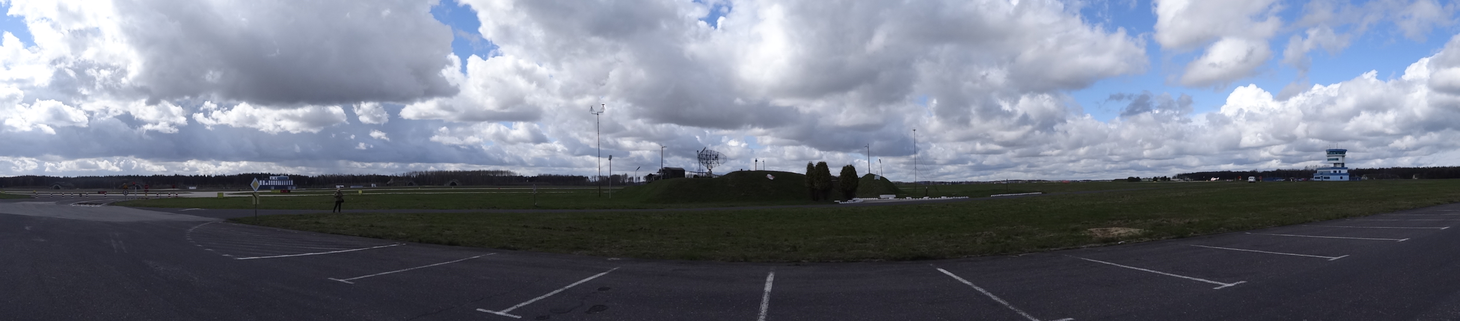 Panorama lotniska Babie Doły w Gdyni